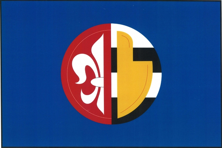 vlajka, Dobročkovice, okres Vyškov